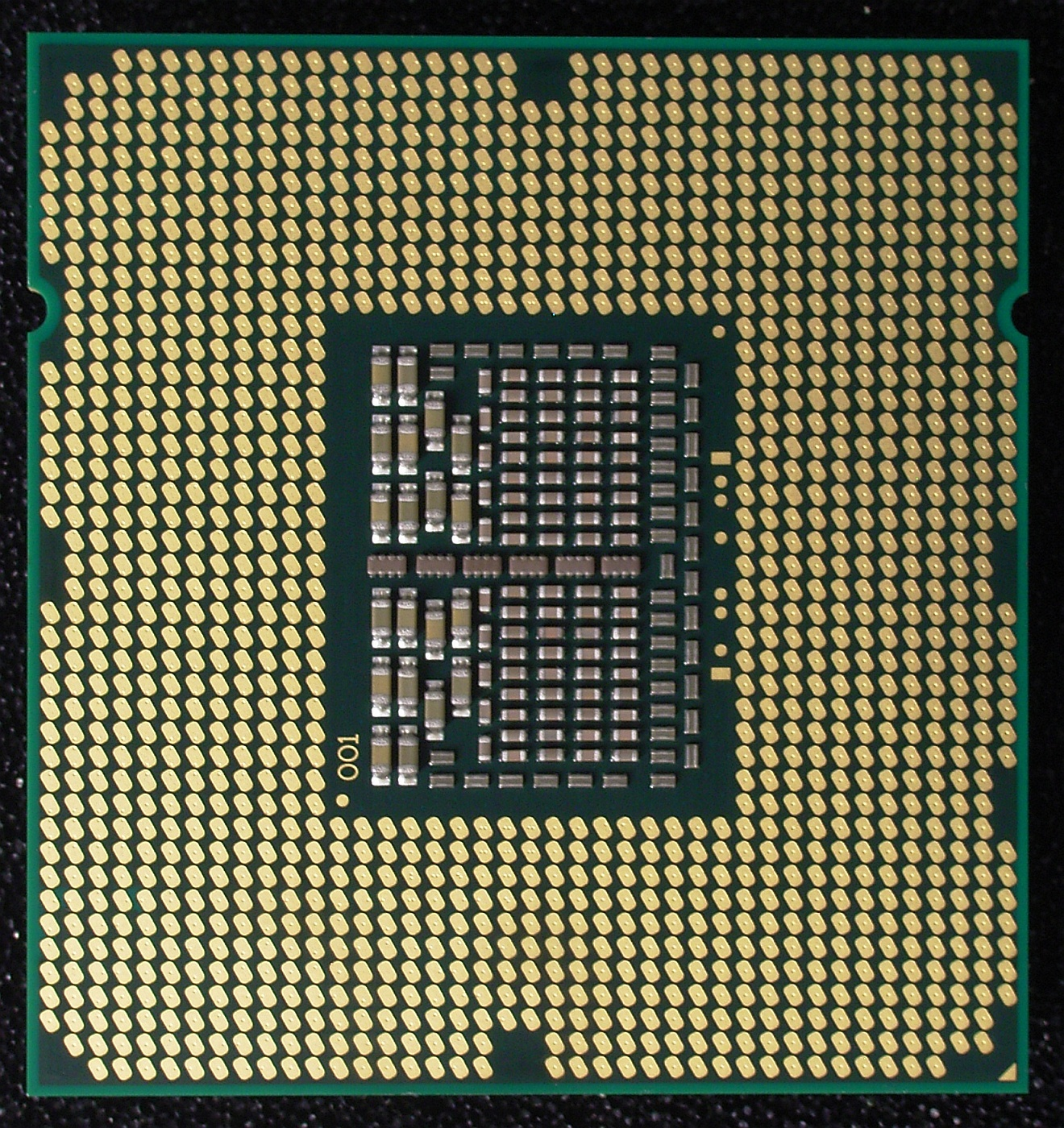 Kontaktseite eines Intel core i7-940, socket 1366